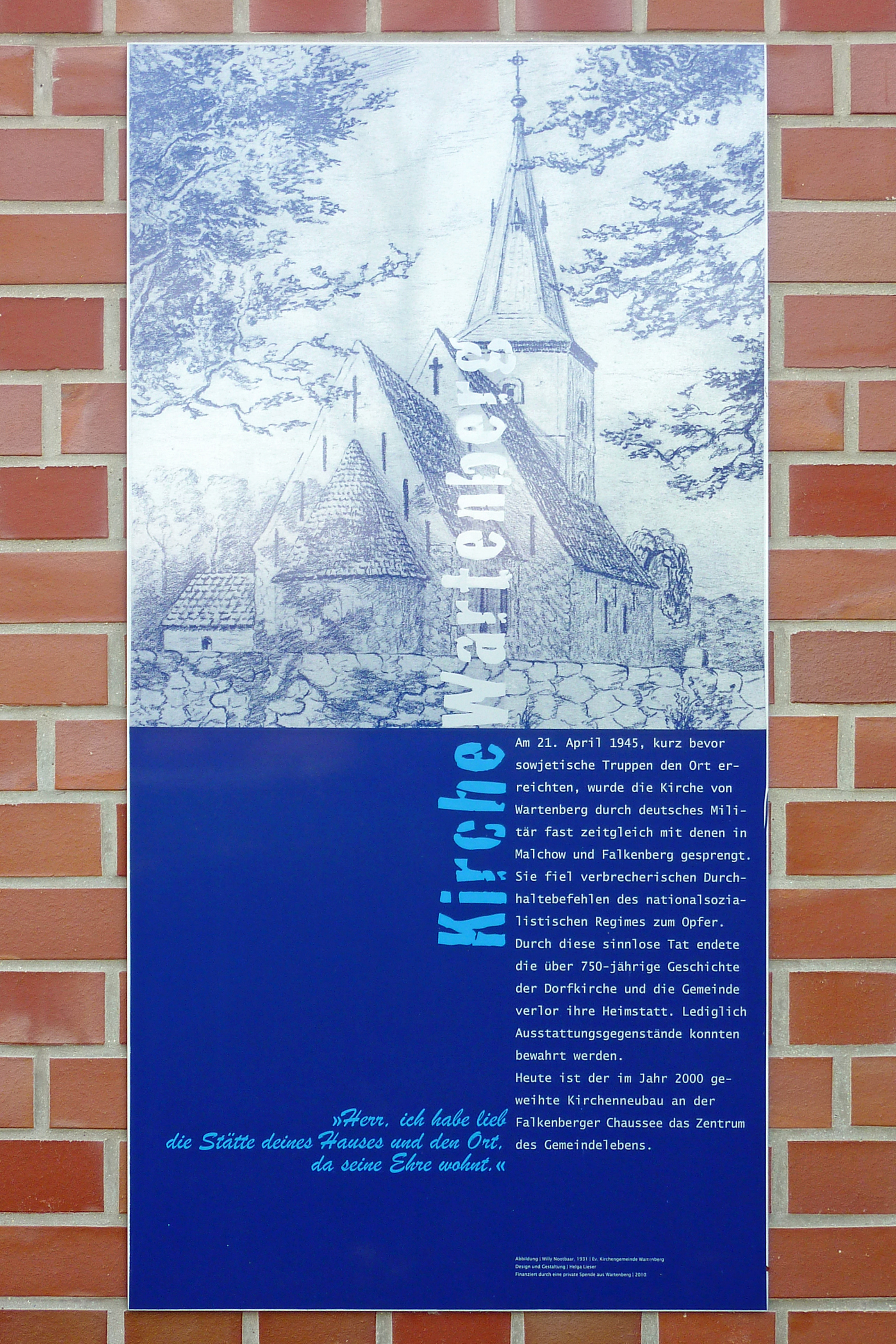 Gedenktafel für die alte Dorfkirche am neueren Anbau des Dorfkirchshofs in Berlin-Wartenberg. Enthüllt am 24. Mai 2010. Finanziert durch Wartenberger Privatspende. Mit einer Abbildung von Willy Nootbaar aus dem Jahr 1931. Design und Gestaltung von Helga Lieser.